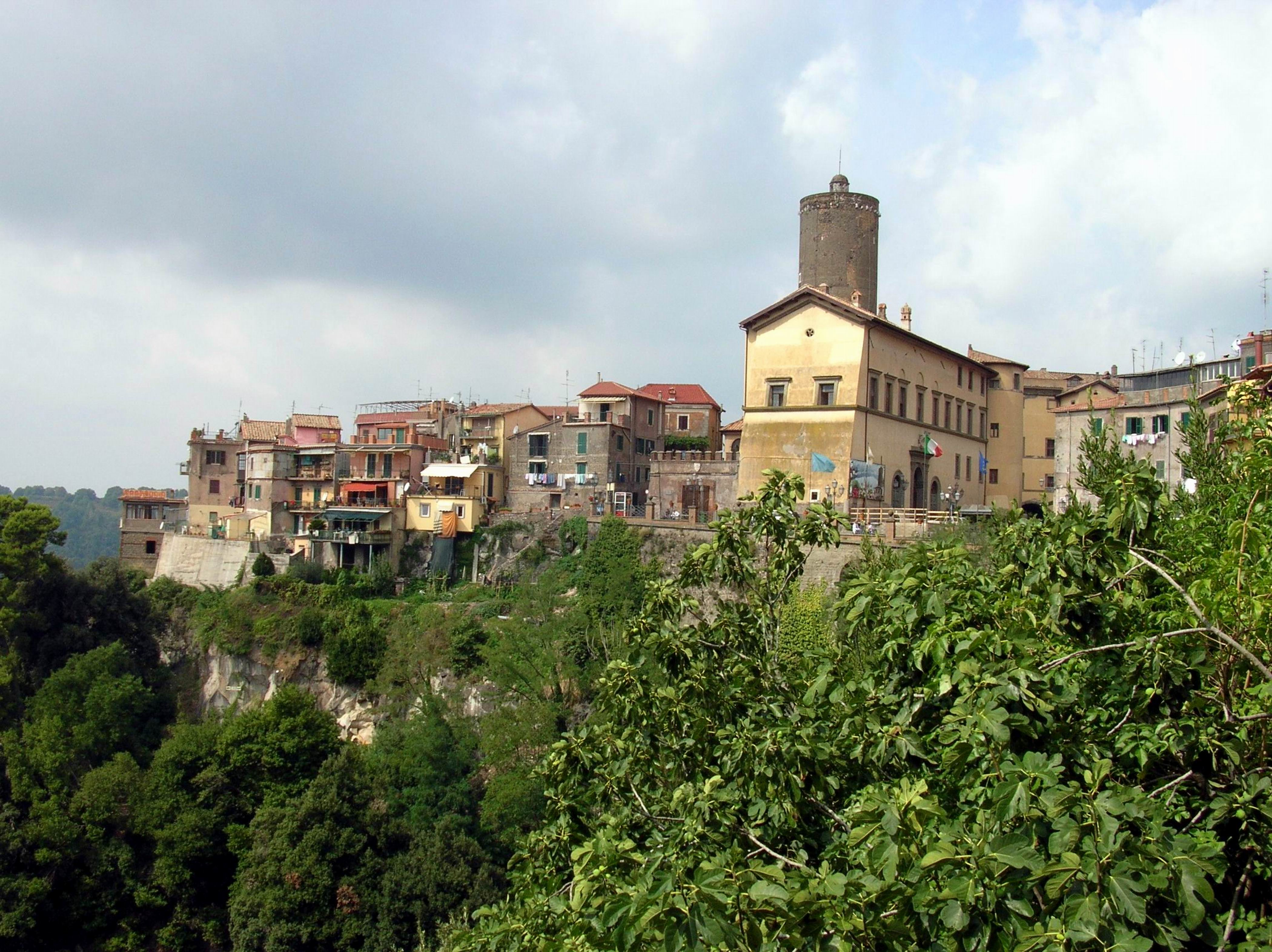 Nemi